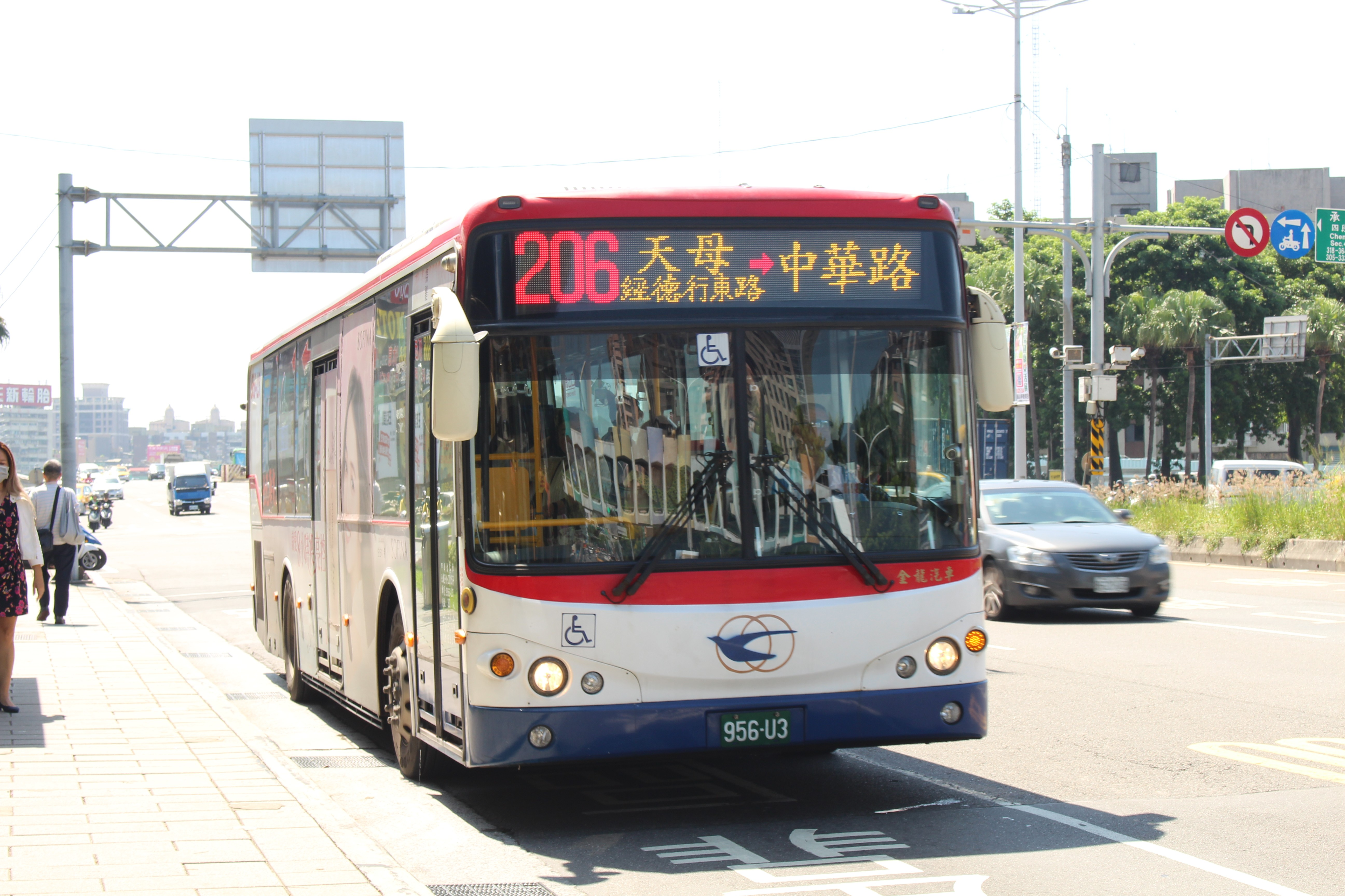 光華巴士2015 KINGLONG KL6112U1 956-U3 206